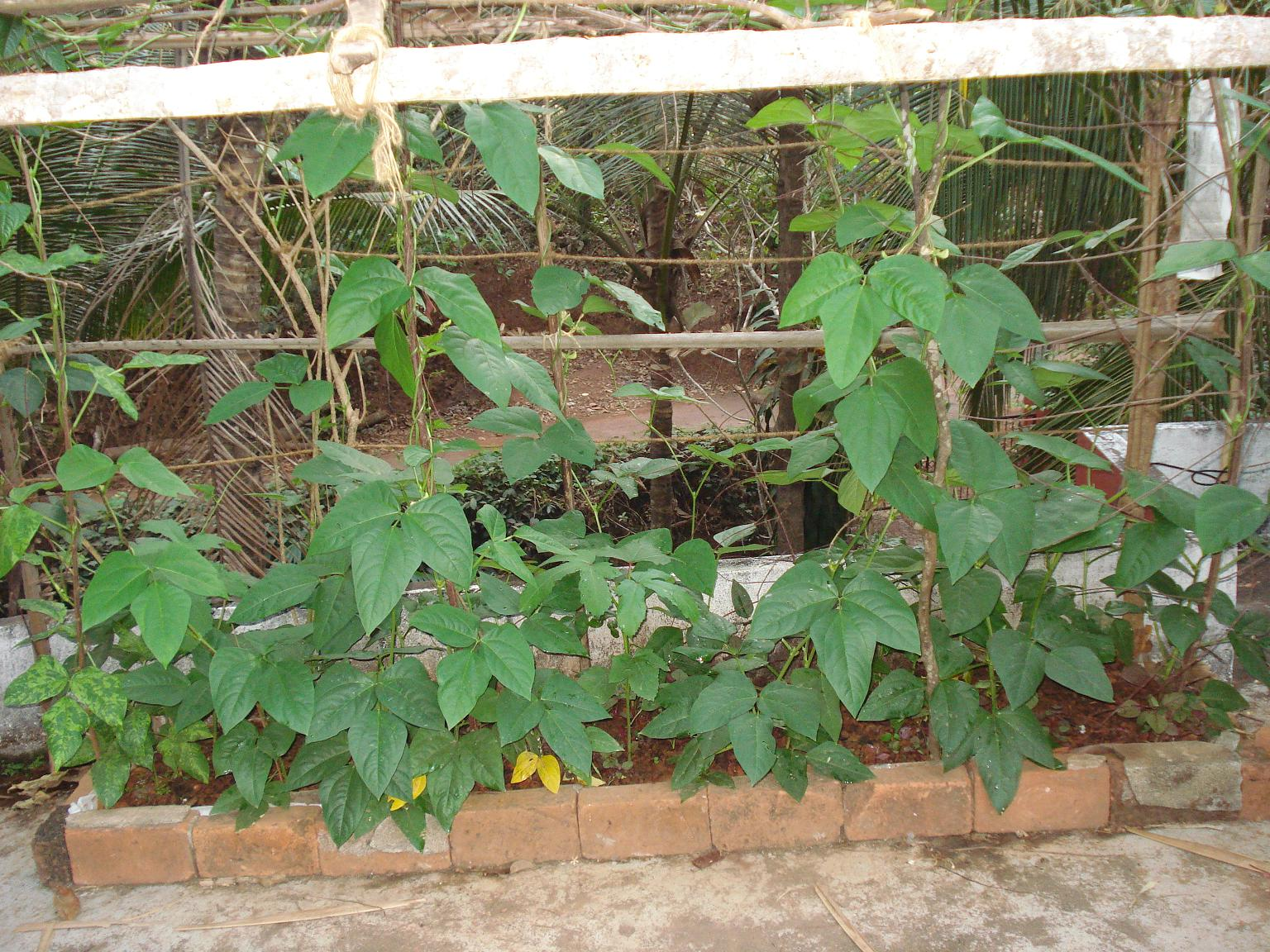 ടെറസ് കൃഷി, പയർ